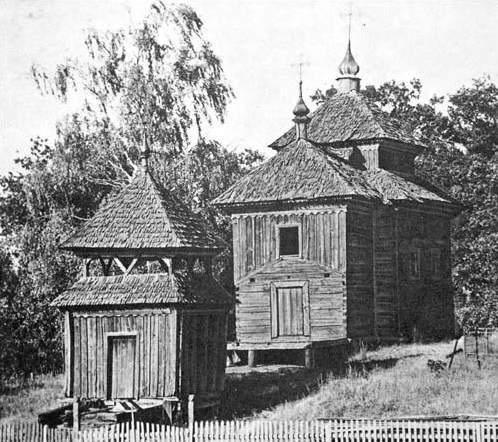 Беларуская (тарашкевіца): Сінкевічы (Sinkievičy). Царква